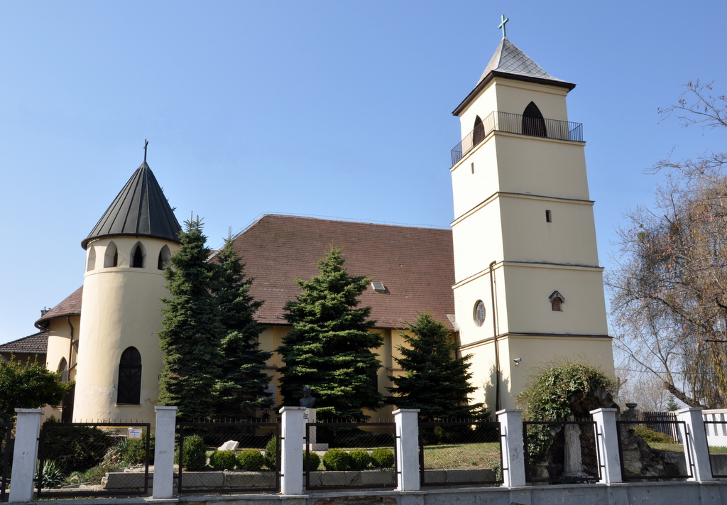 Polish church in Kőbánya